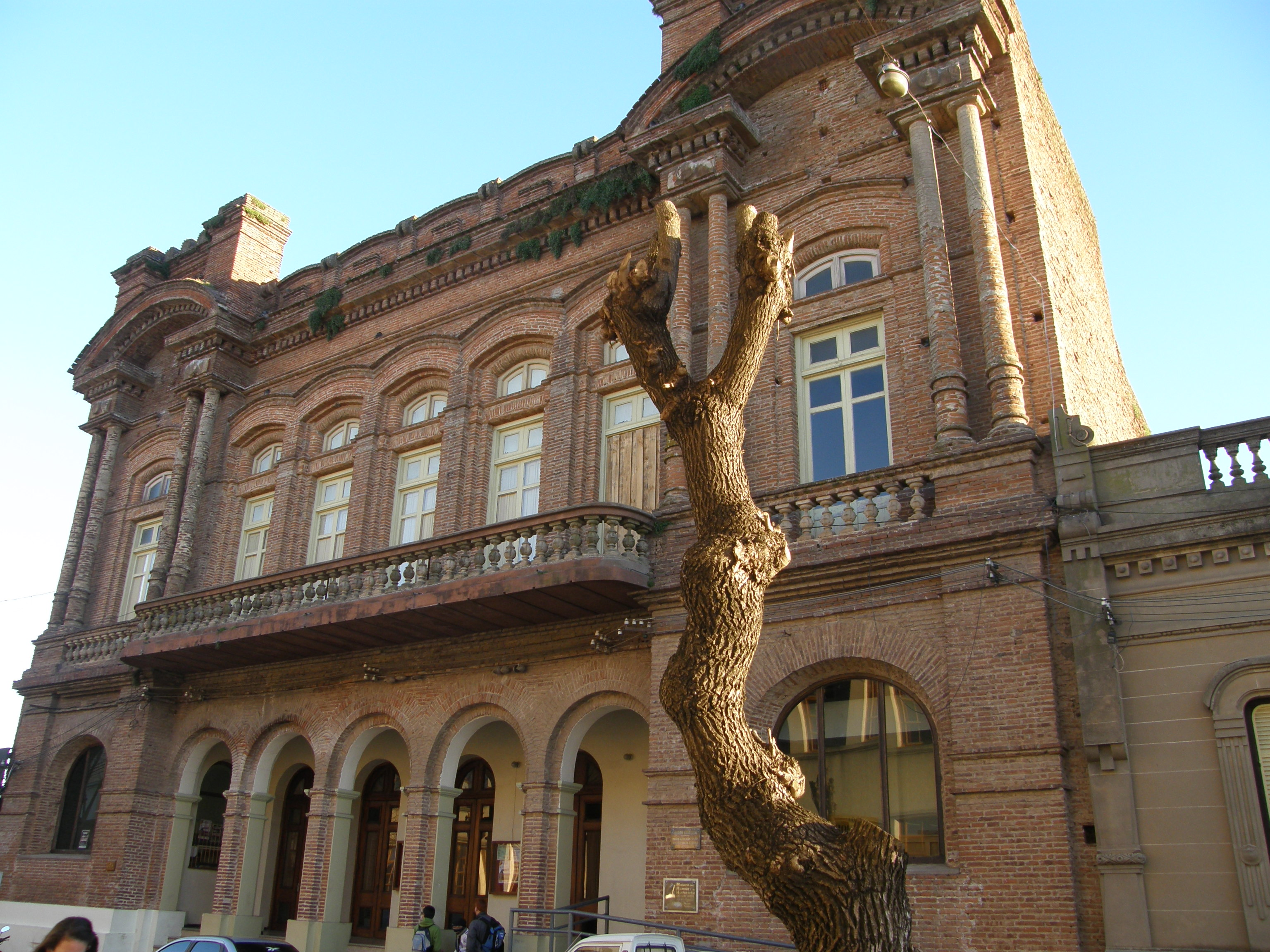 Fachada del Teatro Lavalleja, en Minas, Uruguay